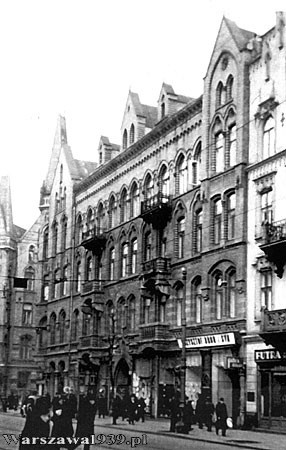 Ulica Marszałkowska 68/70 w Warszawie około 1902 przed II wojną światową. Widok w kierunku północnym